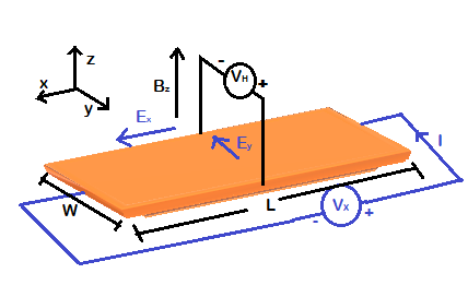 Sistema utilizado para estudiar el efecto Hall